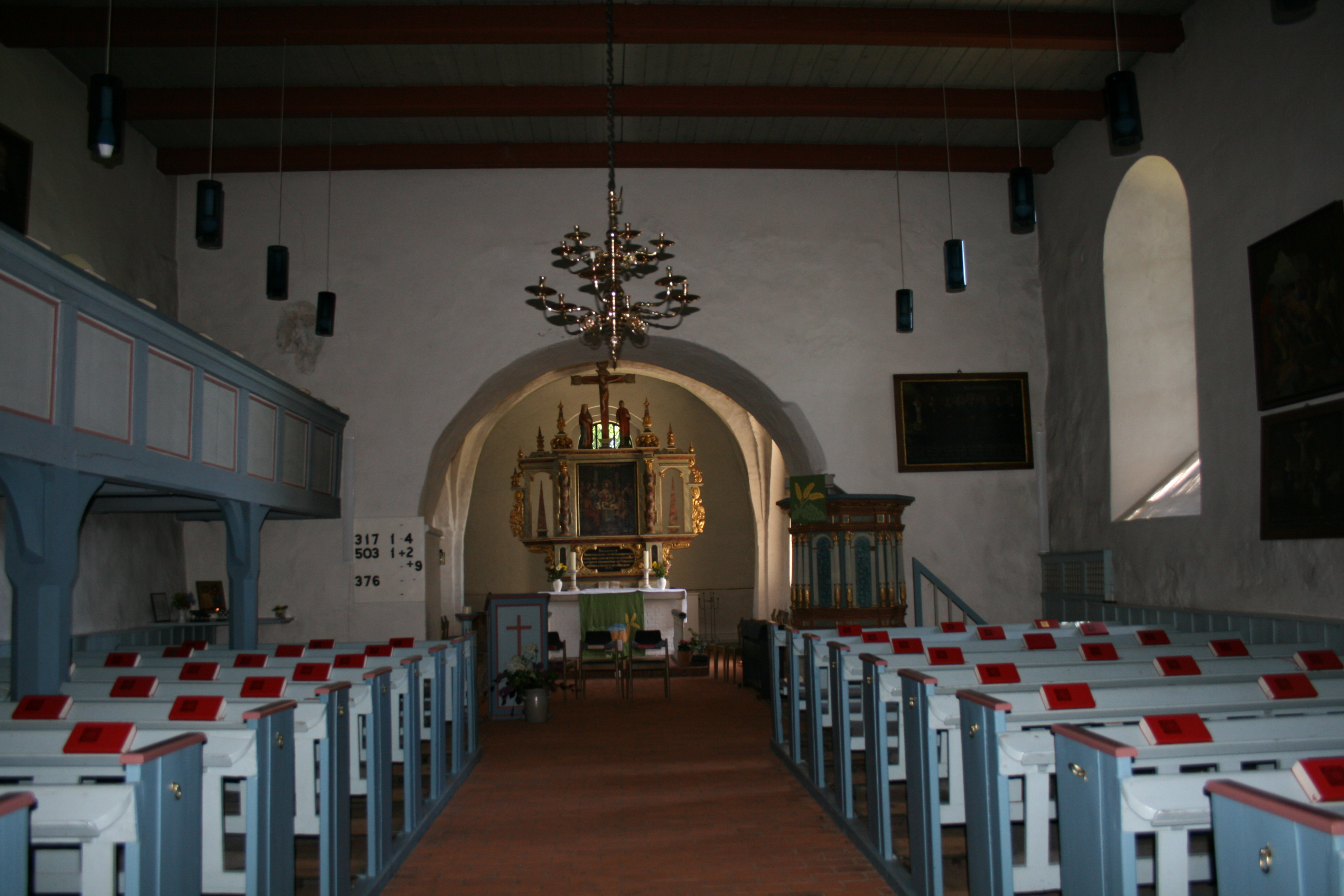 Innenraum der Laurentius-Kirche Kosel (Schleswig-Holstein)